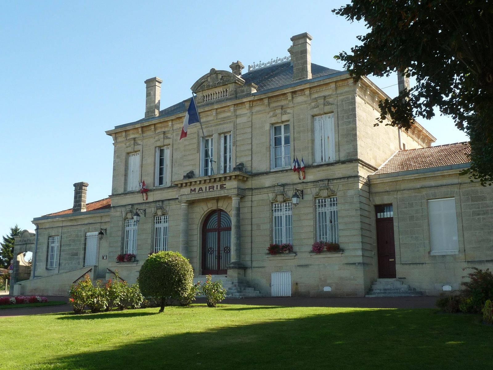 mairie de St-Savin (33), France.